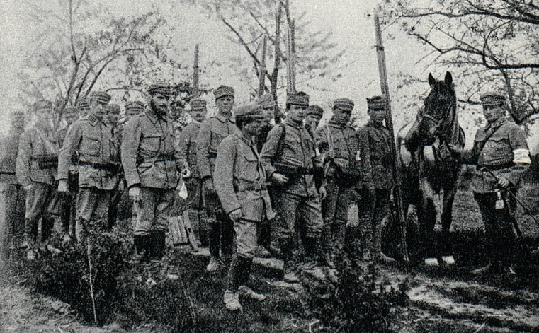 Sanitariusze Legionów Polskich z dr Janem Kazimierzem Gołębiem.